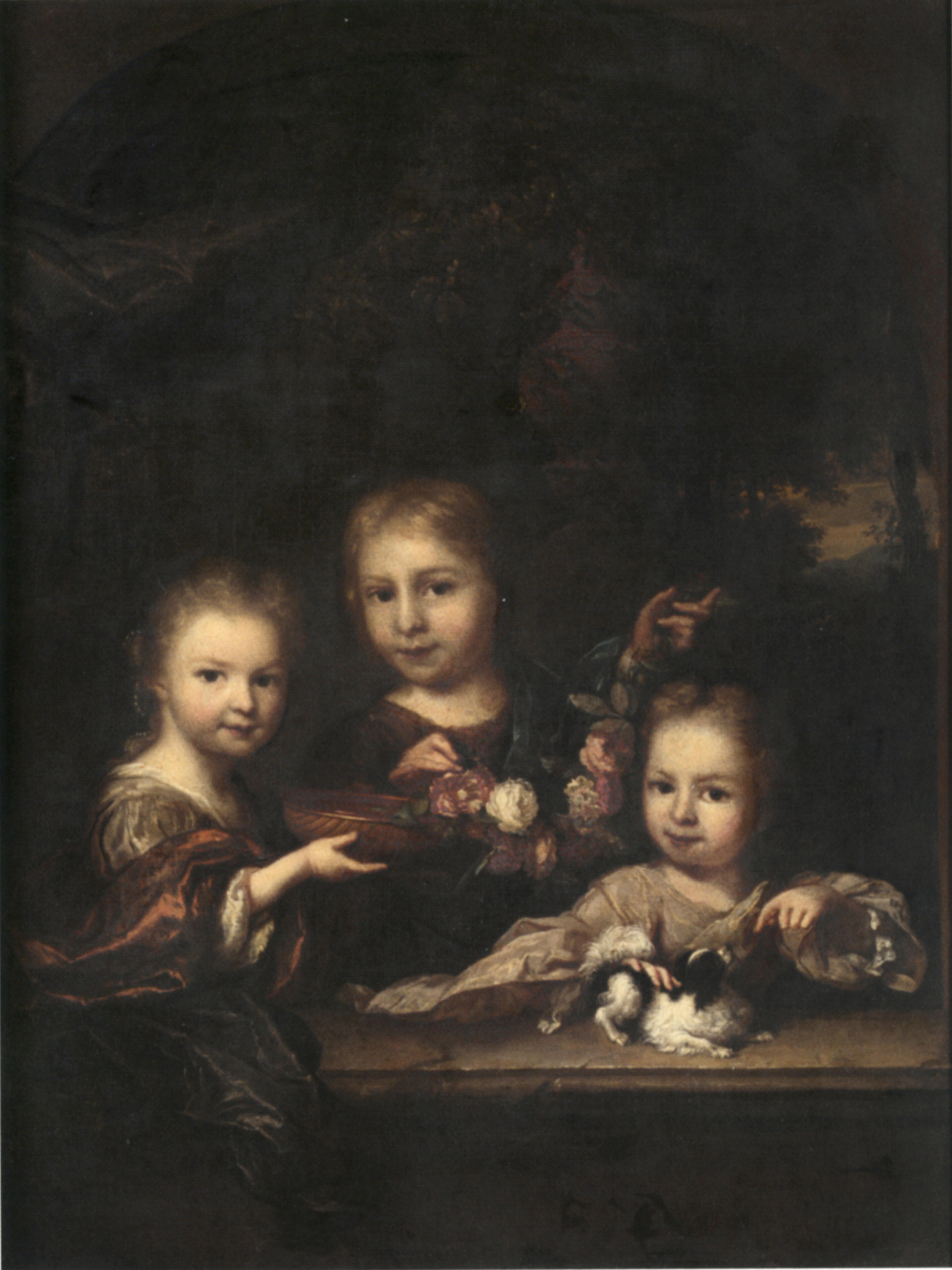 detail van een schilderij met Agatha Levina Geelvinck (1701-1761), Joan Geelvinck (1699) en Anna Elisabeth Geelvinck (1702)